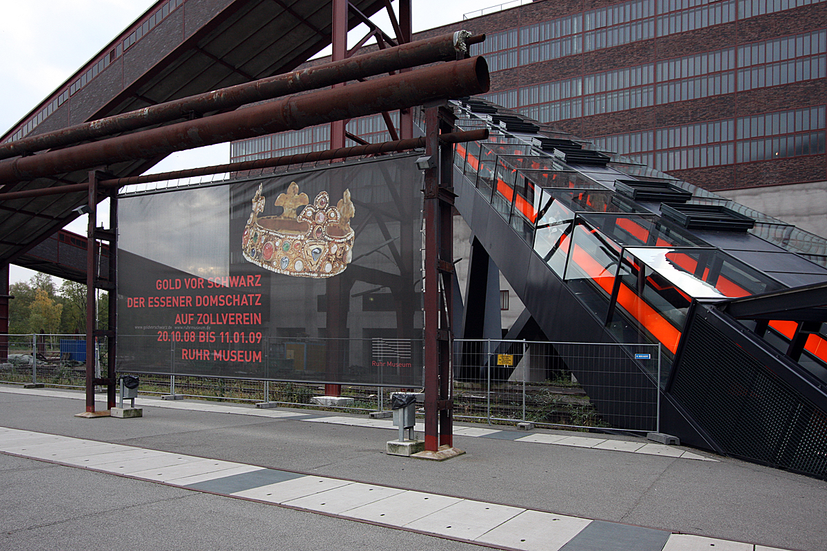 Sonderausstellung „Gold vor Schwarz“ auf Zollverein, Exponate der Essener Domschatzkammer in der ehemaligen Kohlewäscherei. Außenansicht der Kohlewäscherei, Eingang zur Ausstellung